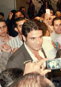 احمد عز فى افتتاح فيلم المصلحة بدبى - مايو 2012